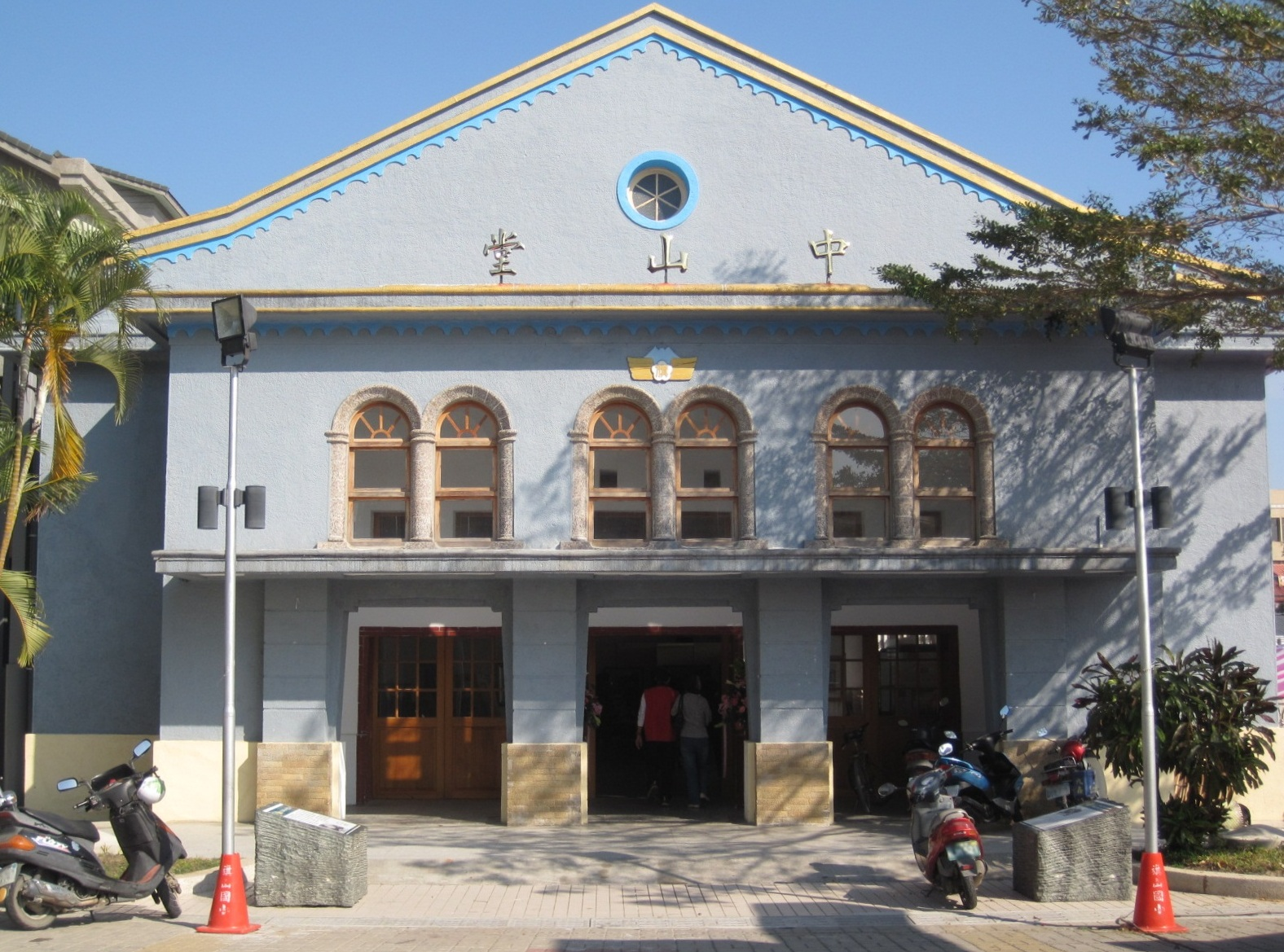 中文（台灣）: 旗山國小大禮堂